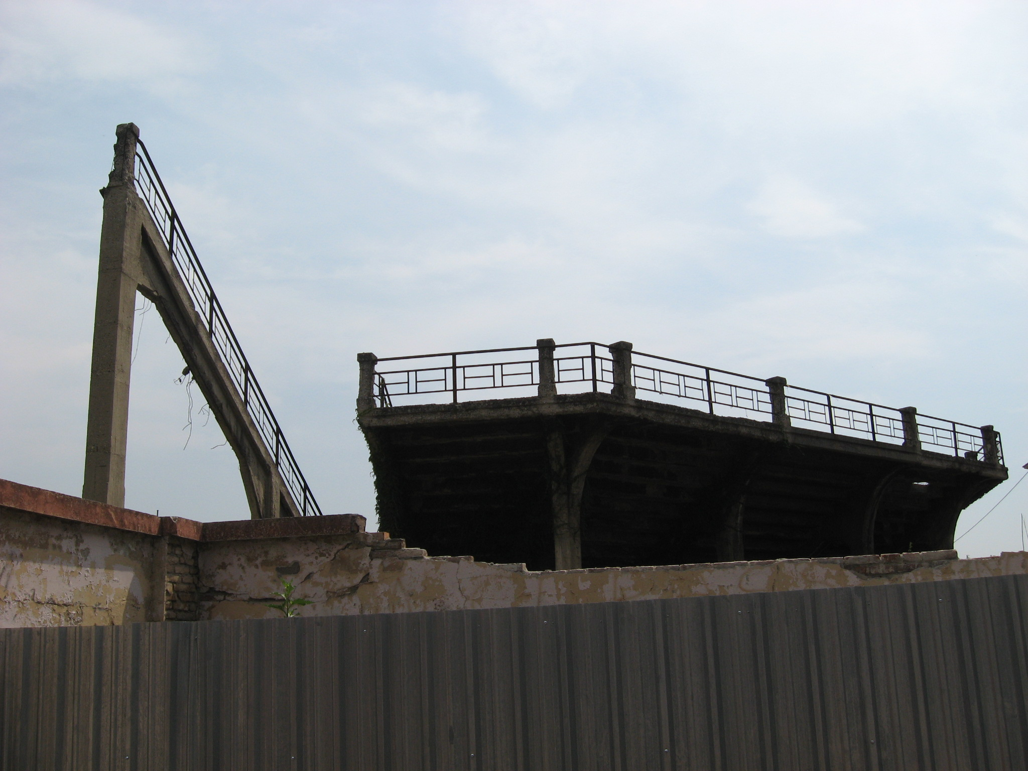 Old Filadelfia stadium in Turin